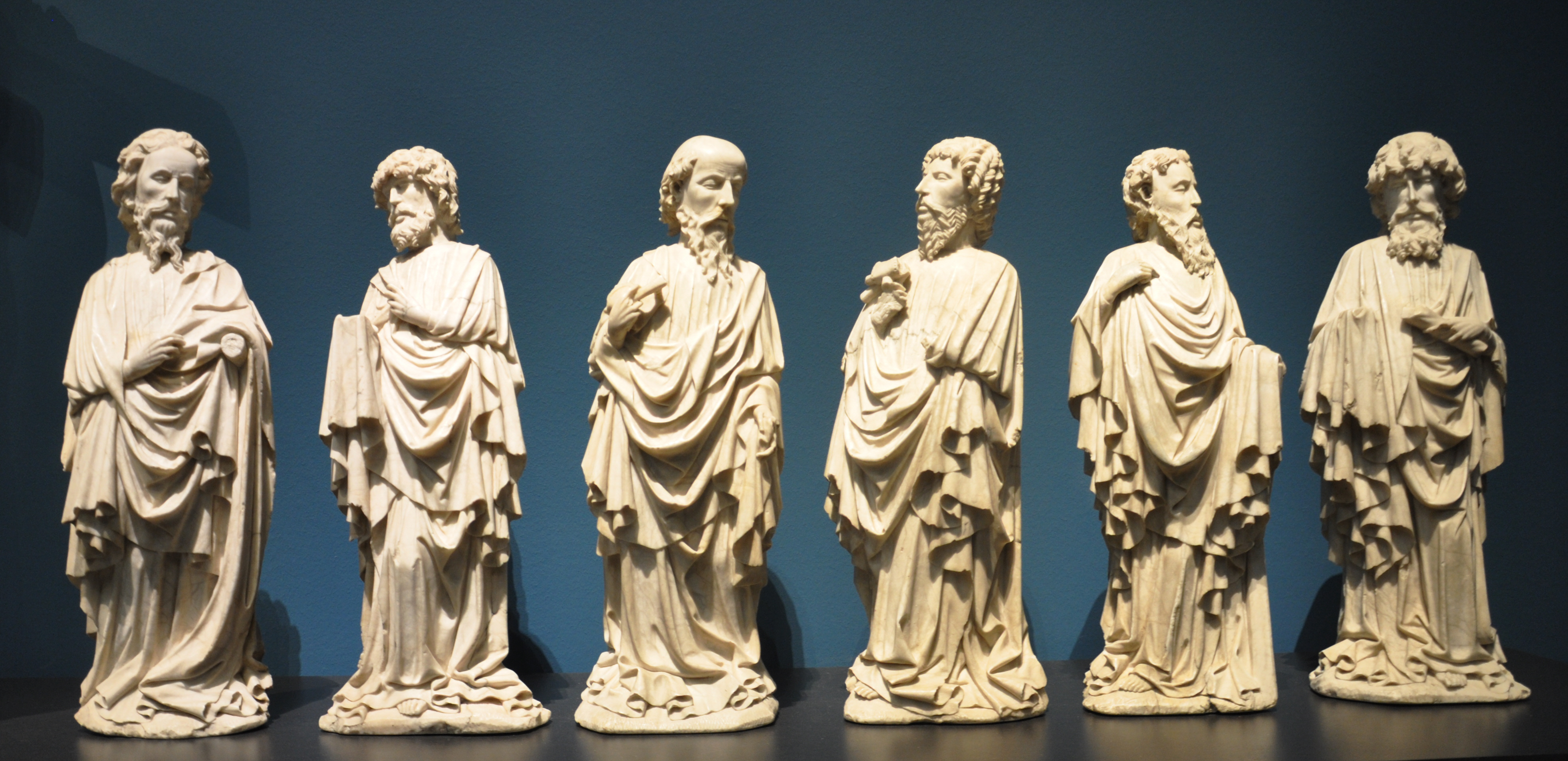 Meister des Rimini-Altars: Kreuzigungsaltar aus Rimini (Rimini-Altar); Südniederlande oder Nordfrankreich, um 1430; Alabaster, geringe Reste alter Fassung Liebieghaus, Frankfurt am Main, Inv. Nr. 400–418; Weblink